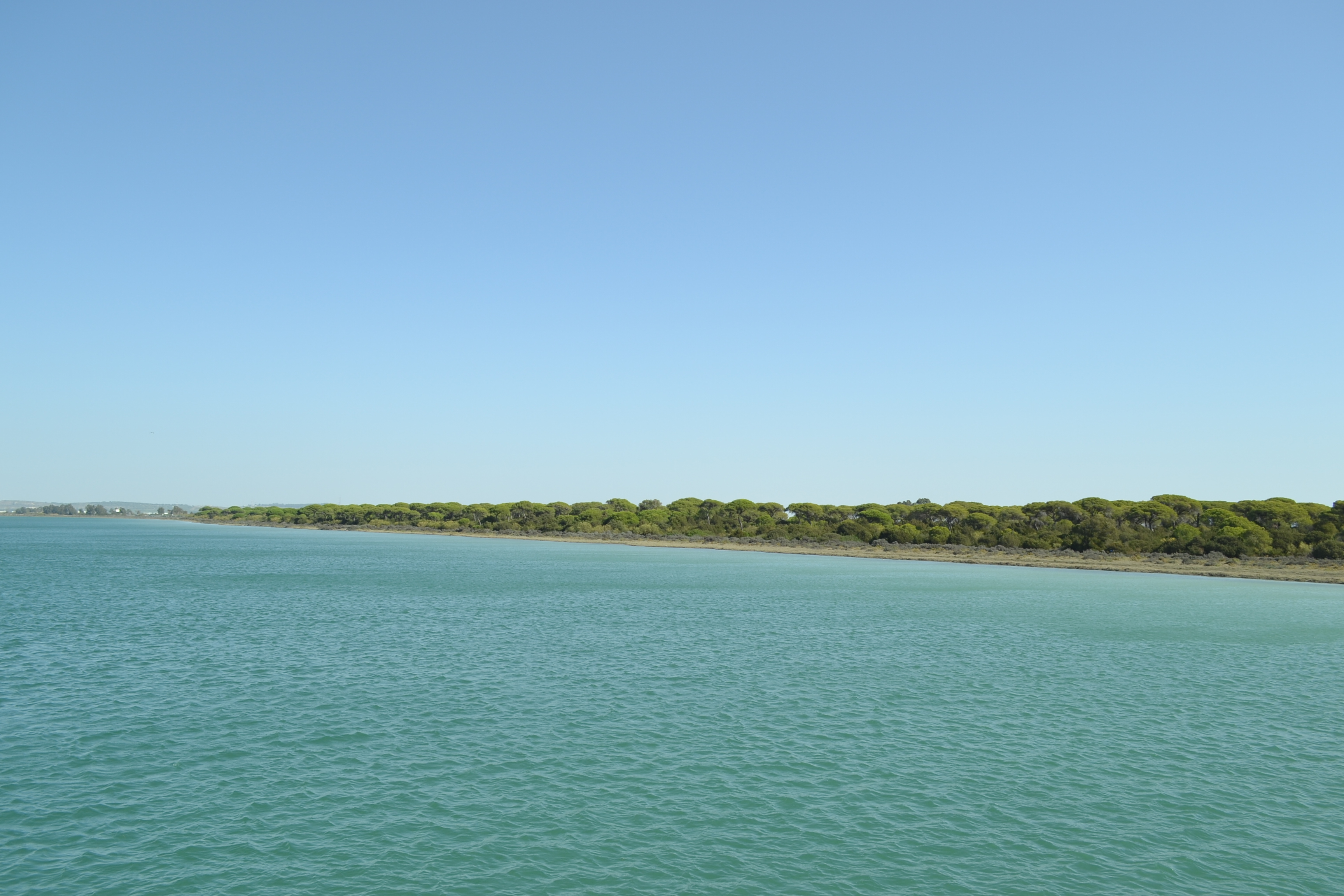 Bahía de Cádiz This is a photography of a Site of Community Importance in Spain with the ID: ES0000140. Natura2000 entry, EEA entry